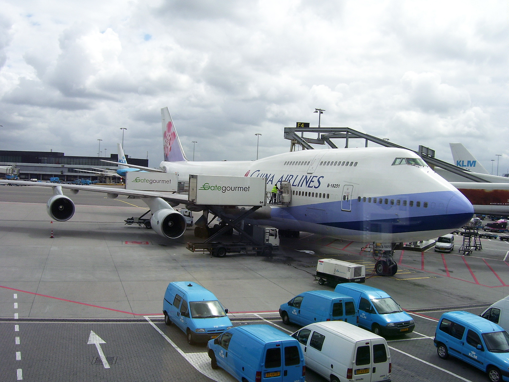 CI0066 klaar voor vertrek naar Bangkok/Taipei.